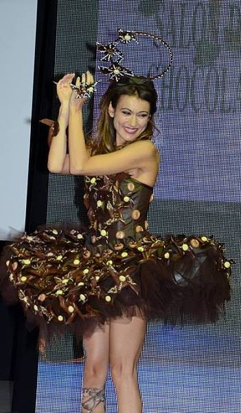 Marie-Ange Casalta au défilé de mode du salon du chocolat.